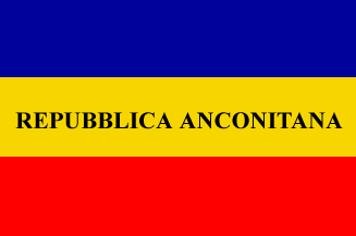 Bandera de la República Anconitana.